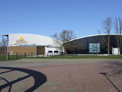 olimpiskais centrs